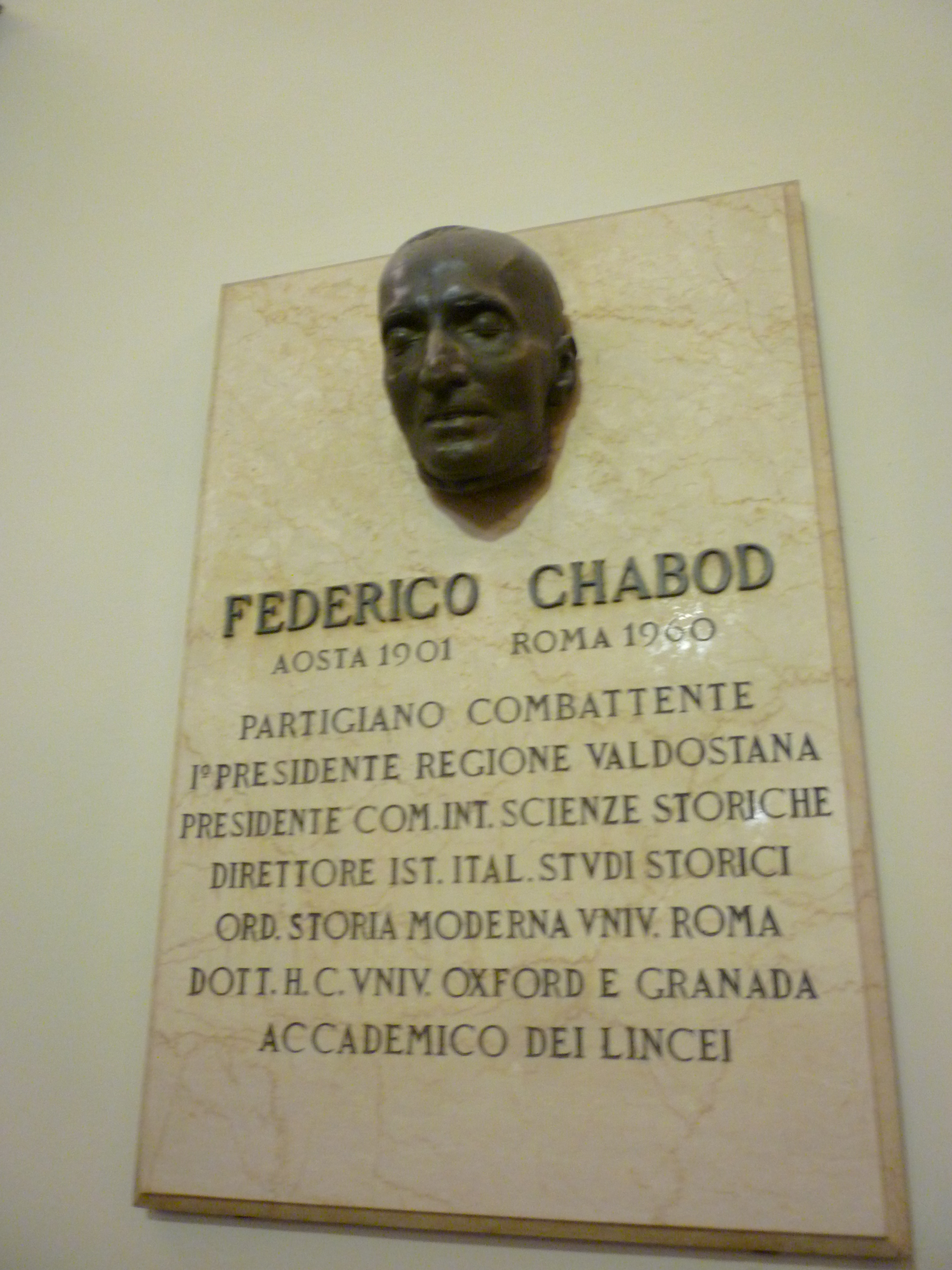 Plaque dédiée à Frédéric Chabod à l'Hôtel-de-Ville à Aoste